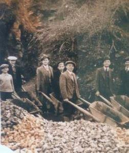 משפחת שוורץ שכנים בבונהאיד